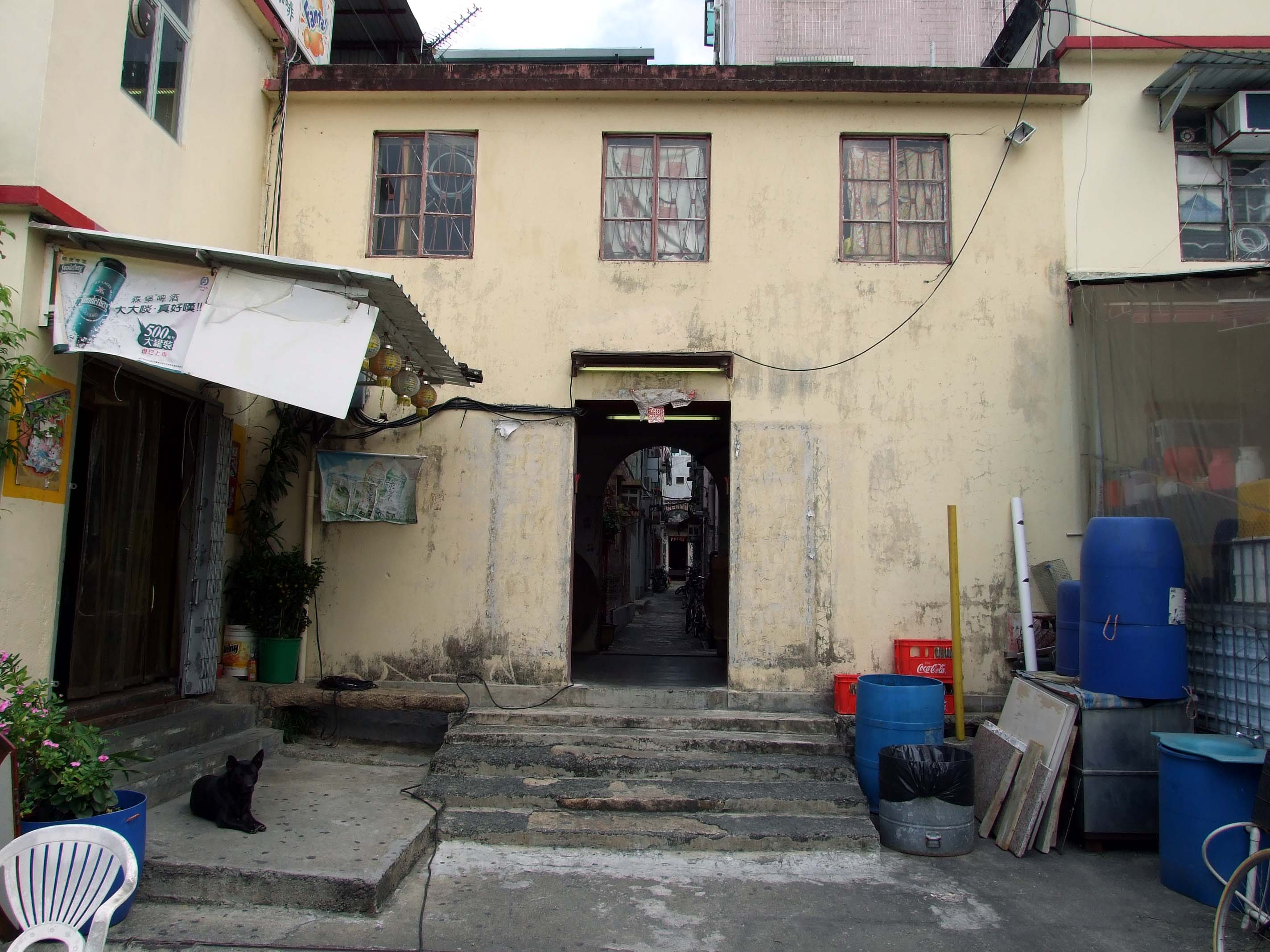 中文（香港）: 廈村田心村